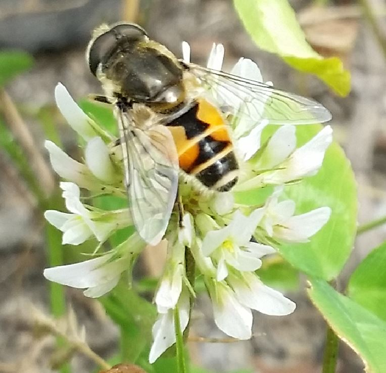 Kleine Keilfleckschwebfliege (Eristalis arbustorum), Männchen, im Schwetzinger Hardt